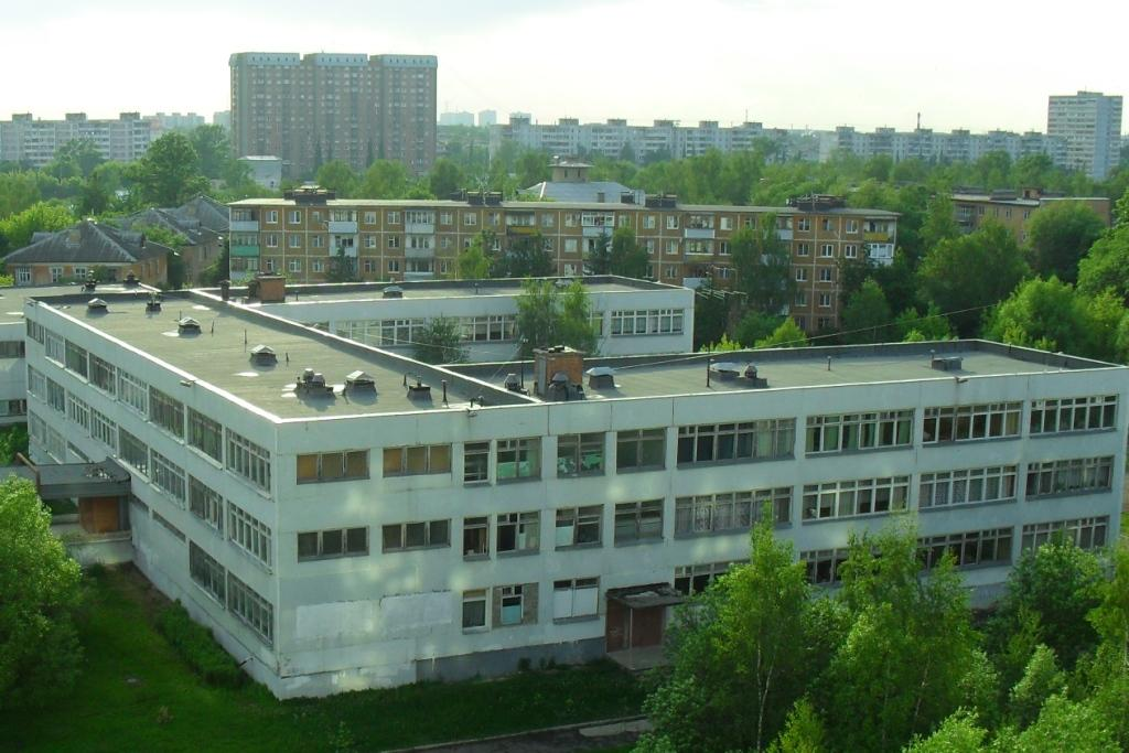 Серпухов без смога 20 июля 2010. Школа №10